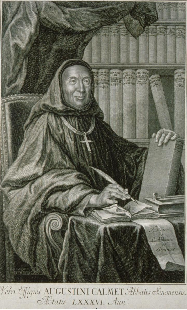 Vera Effigies Augustini Calmet Abbatis Senonensis, gravure représentant Augustin Calmet, Bibliothèque nationale et universitaire de Strasbourg, 1750.